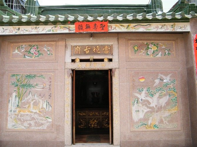 赤港当镜古庙